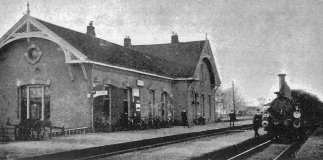 Stationsgebouw van Wierden (1881-1965) rond de eeuwwisseling.